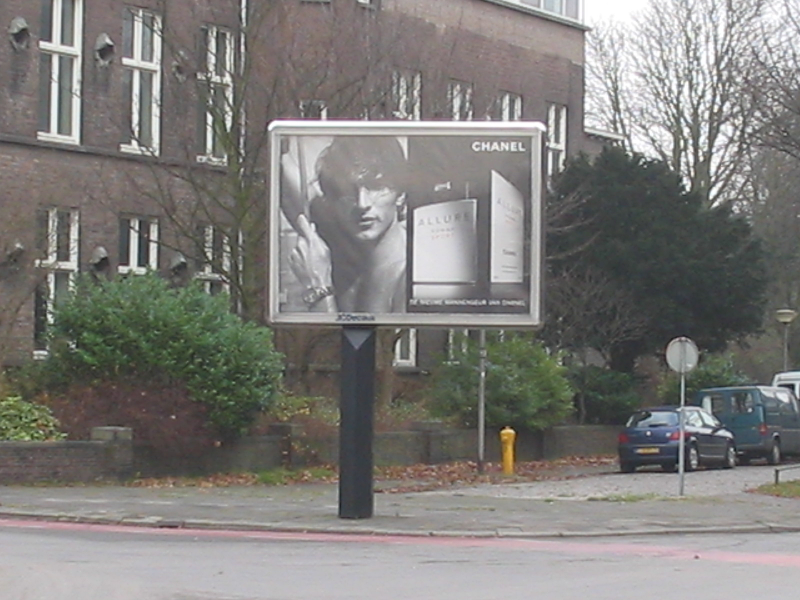 Billboard in delft